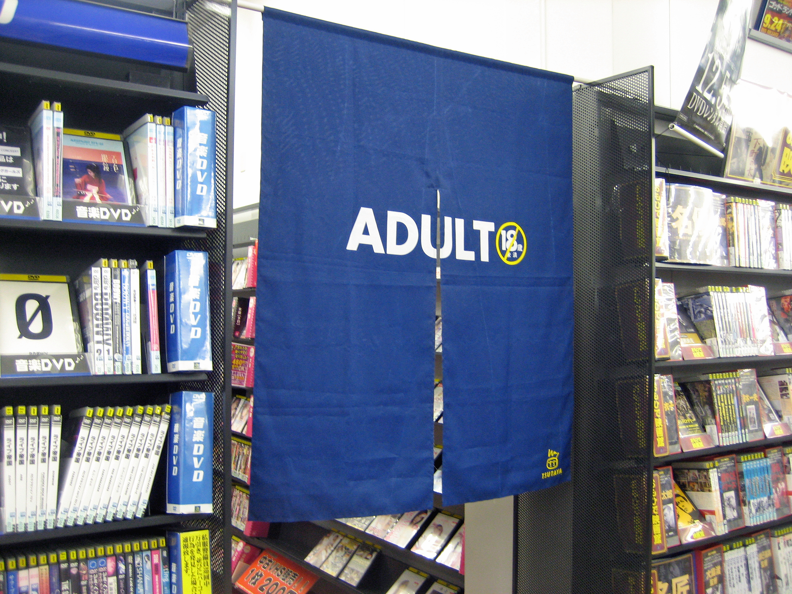 一般的なレンタルビデオ店のアダルトコーナーへの入口。そこは若者達にとって胸躍る魅惑の地として知られている。1人の少年が大人への階段を登っていく為に通らなければならない場であり、また、ある者にとってそこは2次元か3次元のいずれかの選択肢を迫られる試練の場でもある。なお、多くの一般的な若者達はここで異性についての情報をさまざまな角度から学んでいくと言われている。また！普通のビデオよりレンタル料金が高めに設定されていることについてはレンタルビデオ店に通う人々のあいだで長らく語り継がれており、レンタルビデオを取り巻く謎のひとつとされている。ちなみに昔はダビングし放題でもあったという。